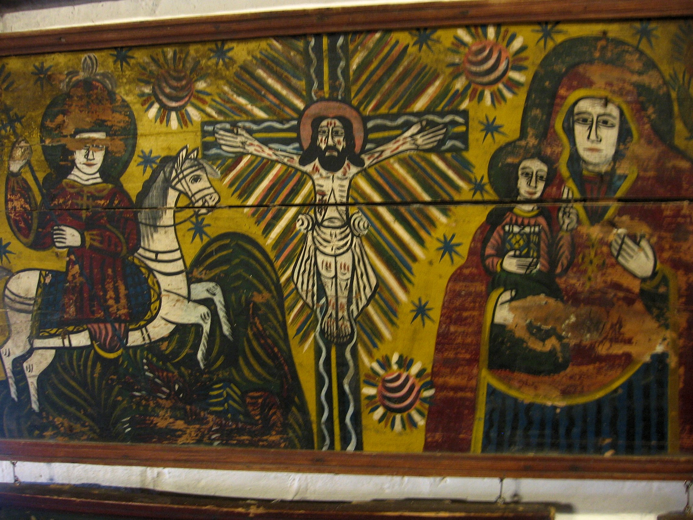 Ікона з експозиції музею домашньої ікони у Радомишлі